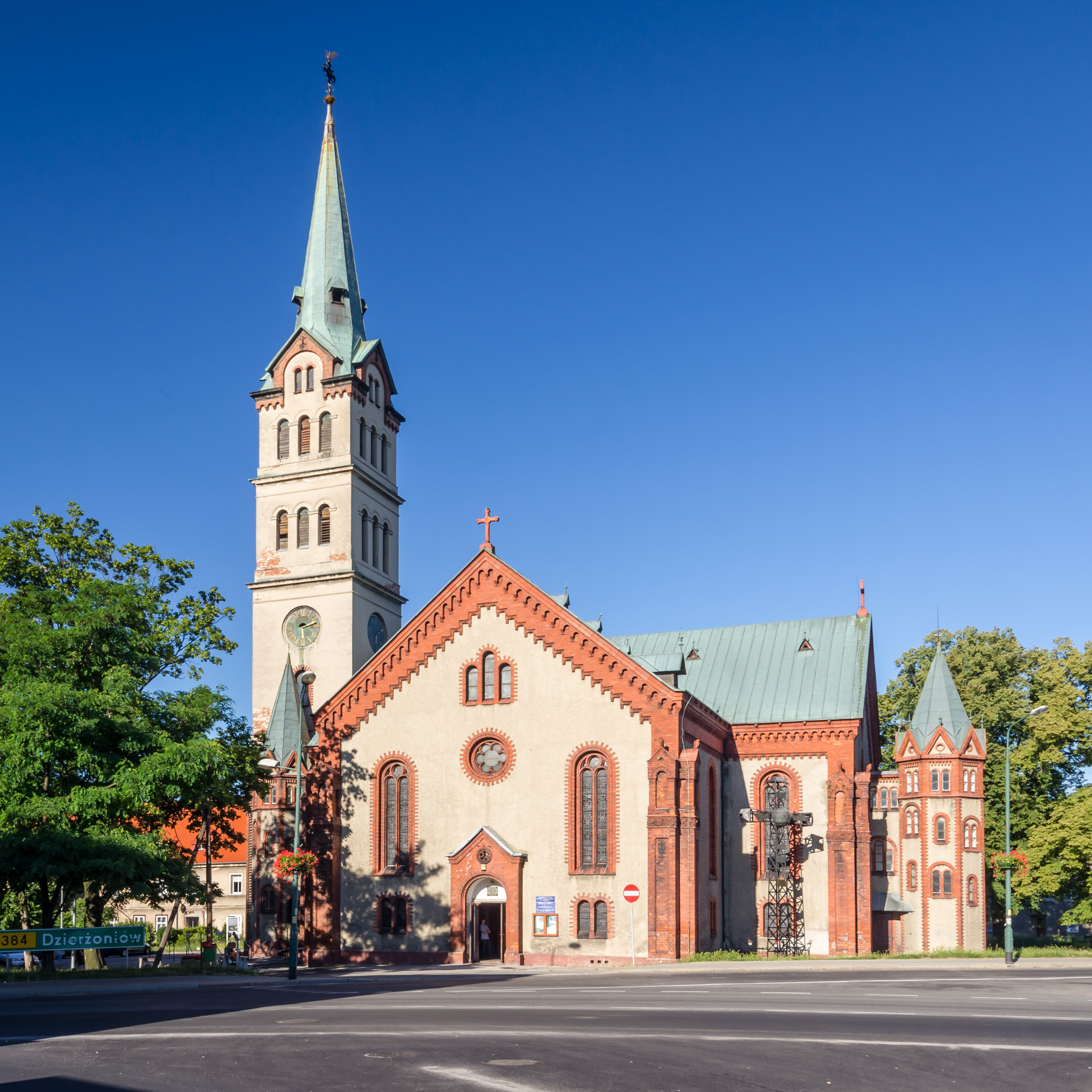 Bielawa, kościół par. p.w. Bożego Ciała (dec. p.w. św. Ducha), 1877-1880 This photo of Lower Silesian Voivodeship was taken during Wikiexpedition 2013 set up by Wikimedia Polska Association.You can see all photographs in category Wikiekspedycja 2013. The making of this document was supported by Wikimedia Polska.